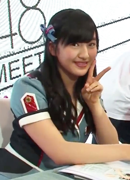 中文（香港）: HKT48 Fans Meeting 2015-05-12 @ 西九龍中心